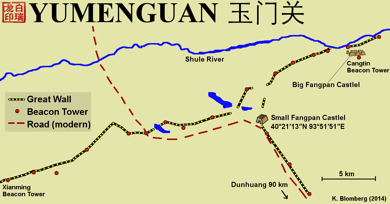 Map over Yumenguan